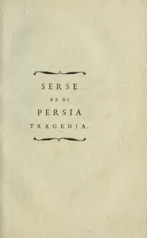 Opere edite e inedite in prosa ed in versi dell'abate Saverio Bettinelli ... Tomo 1. [-24.]. 19. - Seconda edizione riveduta, ampliata, e corretta dall'autore. - Venezia : presso Adolfo Cesare, 1800. - 262, [2] p. . Inizio della tragedia (p. 115)